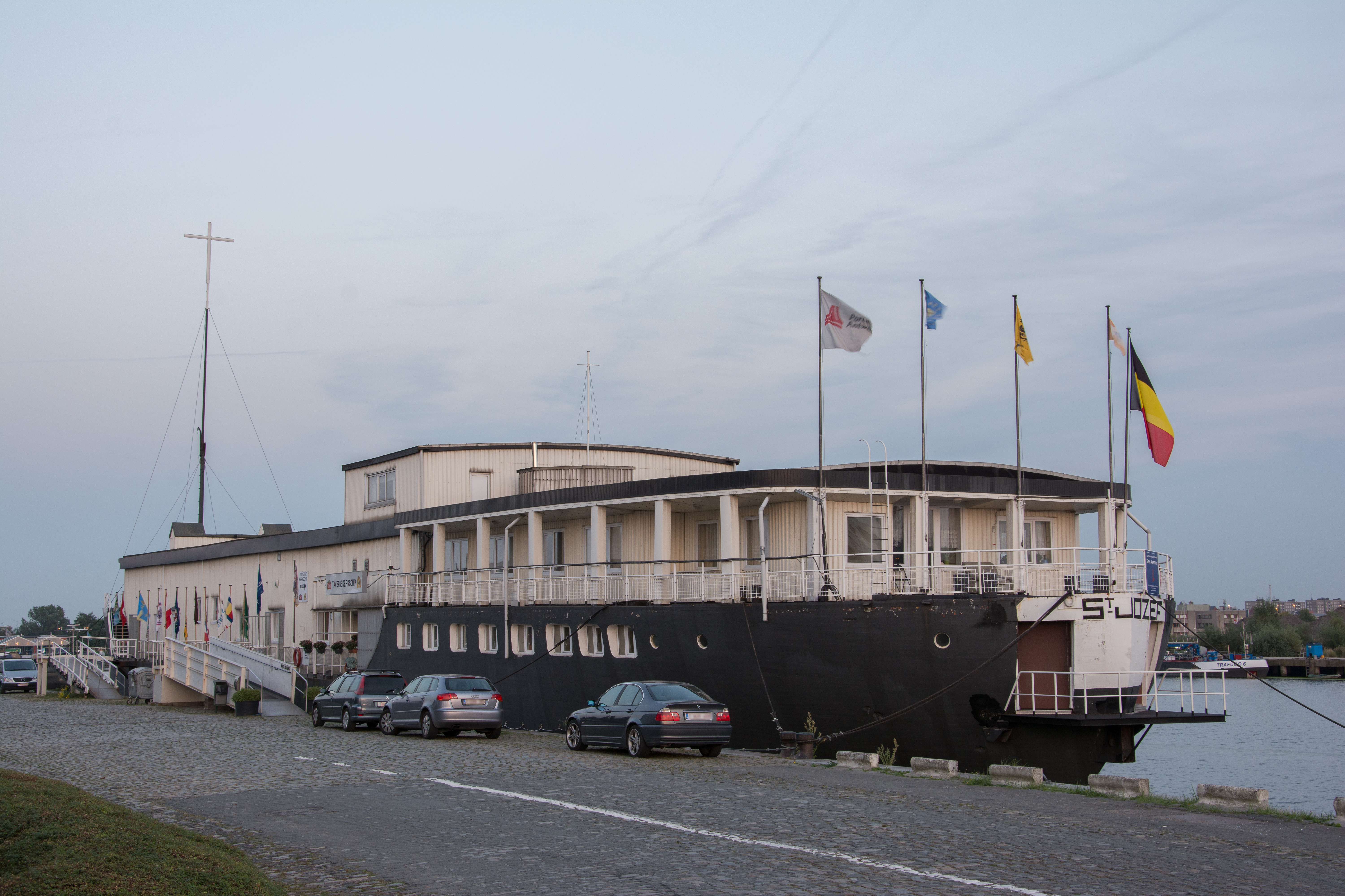 Kerkschip Sint-Jozef, Kanaaldok B1